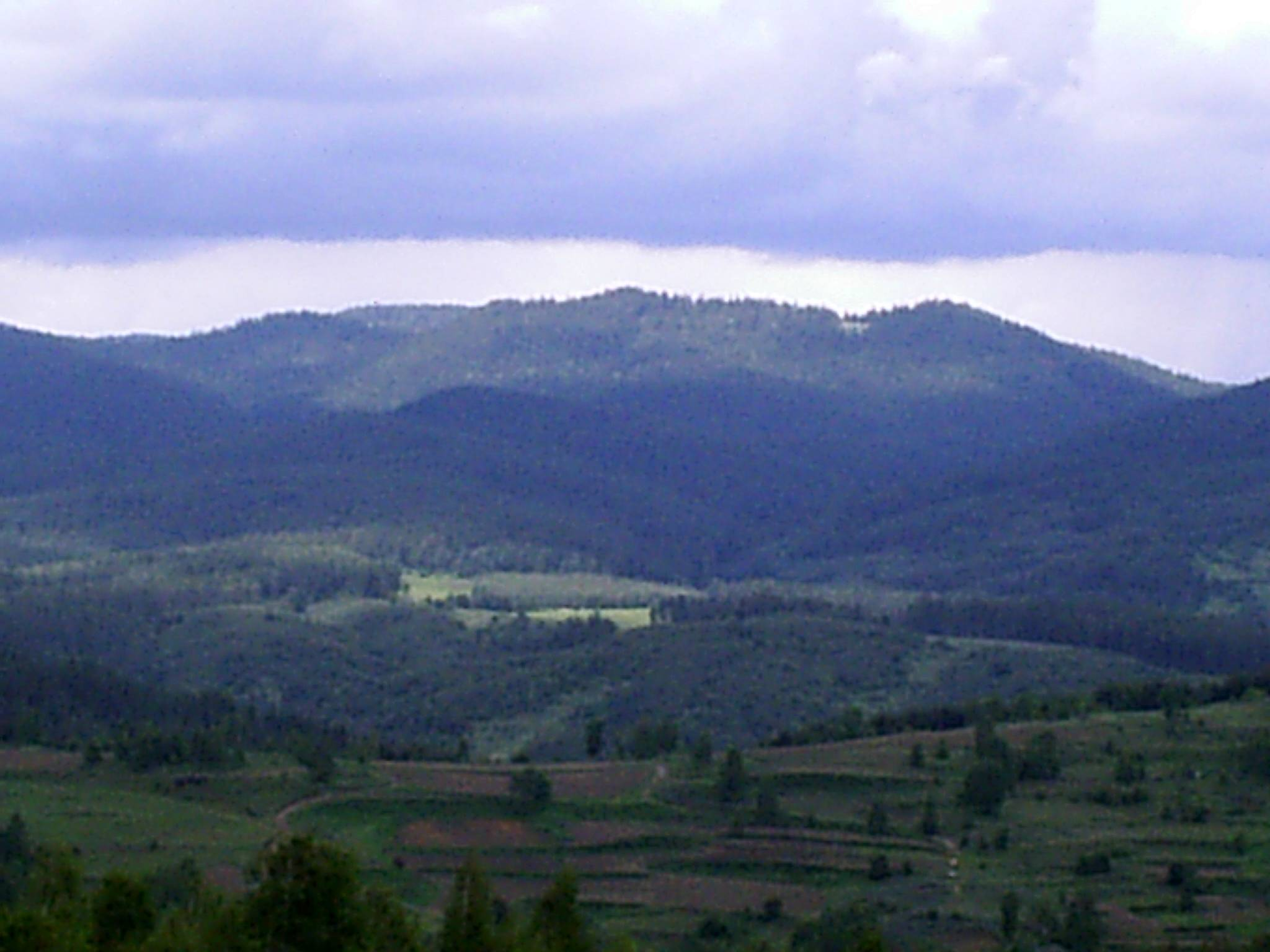 Поглед към връх Чарджик, в чието подножие се намира резерватът Конски дол.